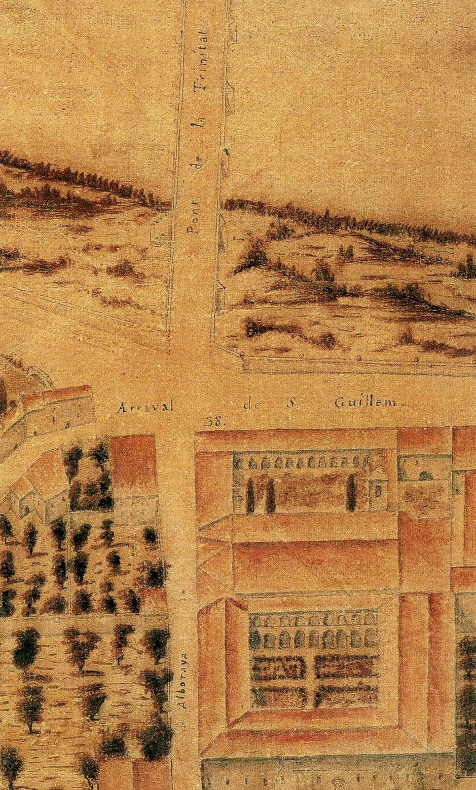 Monestir de la Trinitat de València, vist en el plànol de Tomàs Vicent Tosca (1704).